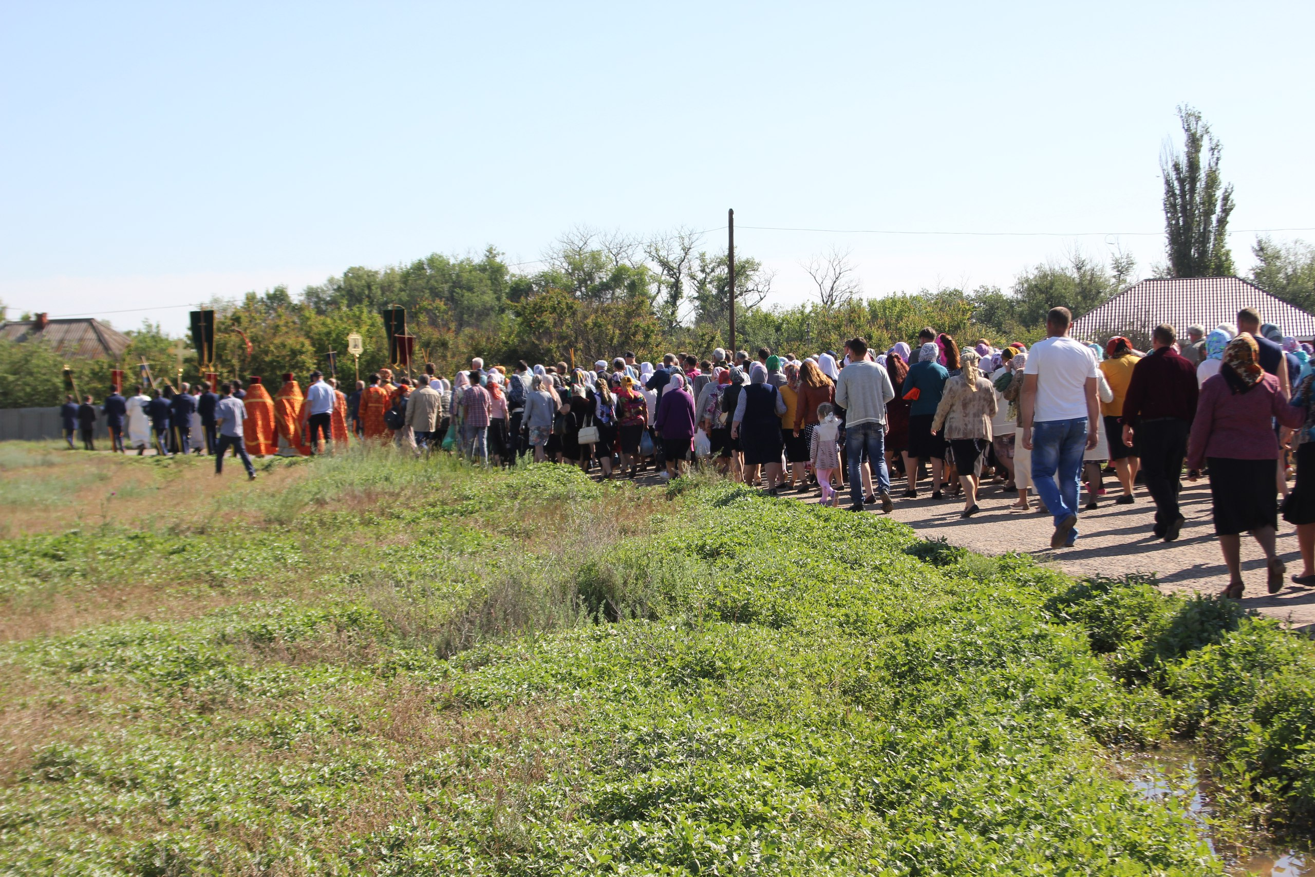 Зубовка